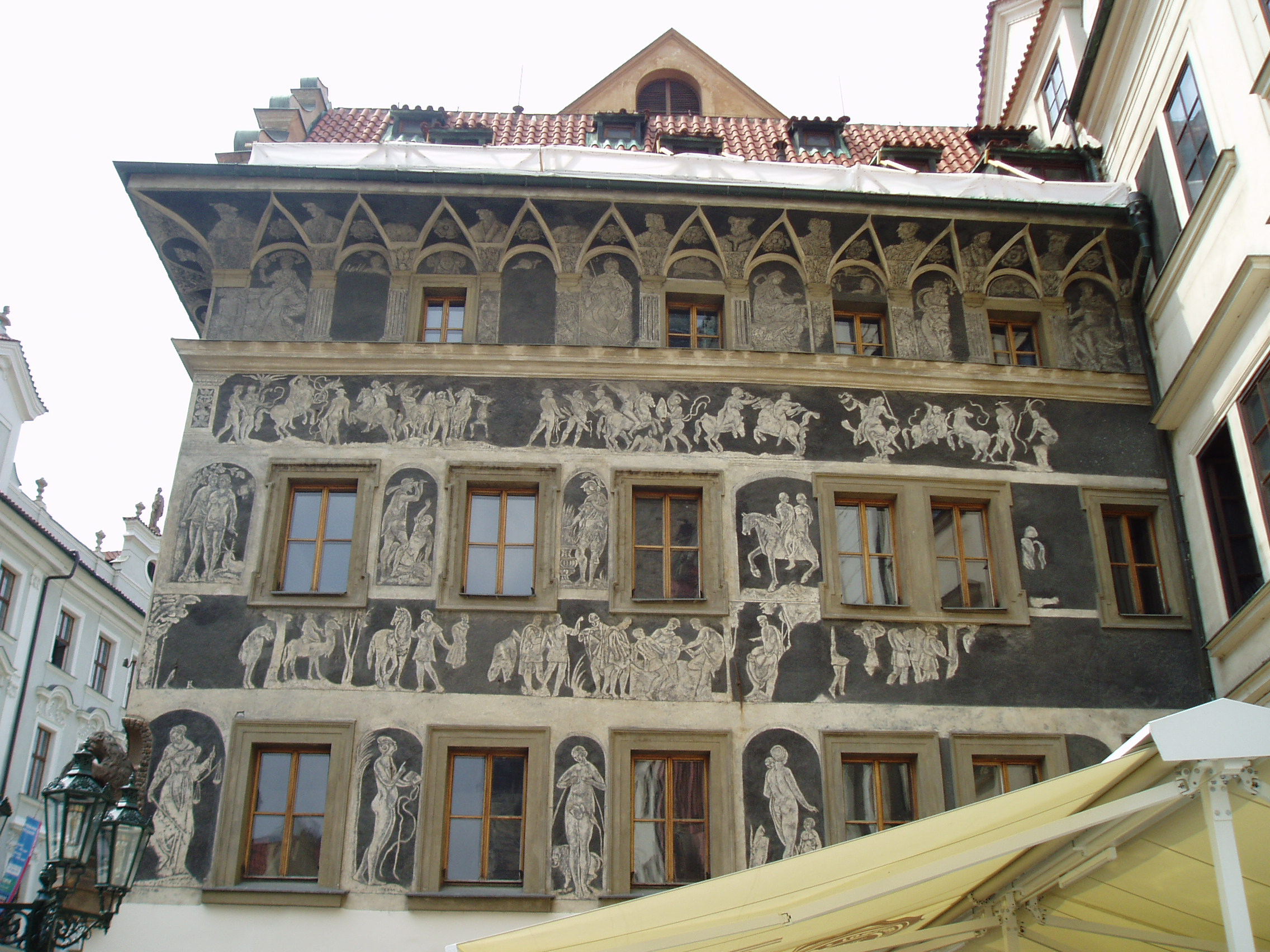 Dům U Minuty